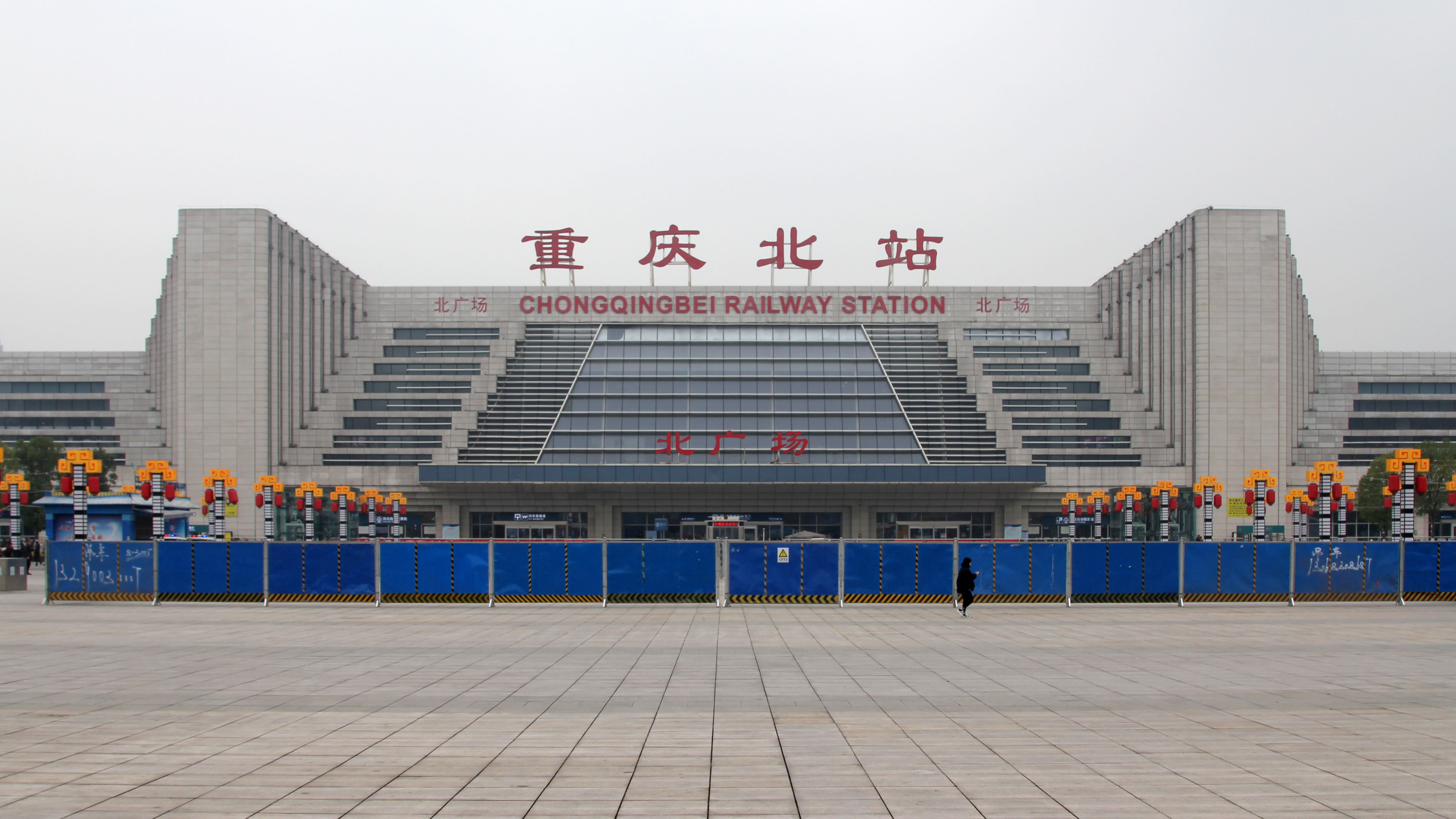 中文（中国大陆）: 重庆北站北广场前